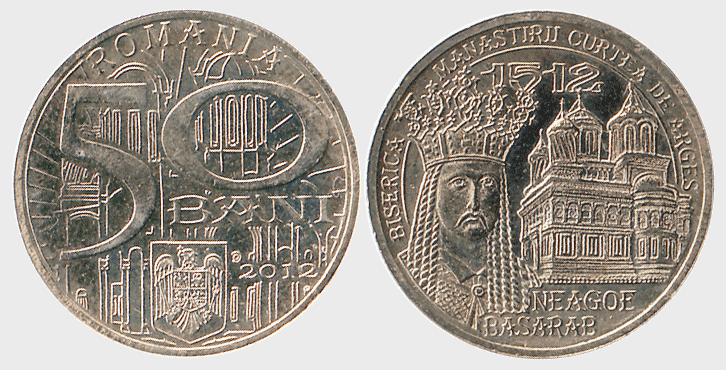 Зображення монети Румунії (50 бані 2012 р.) з приватної колекції Деми Юрія. Тема монети - Нягое Басараб.